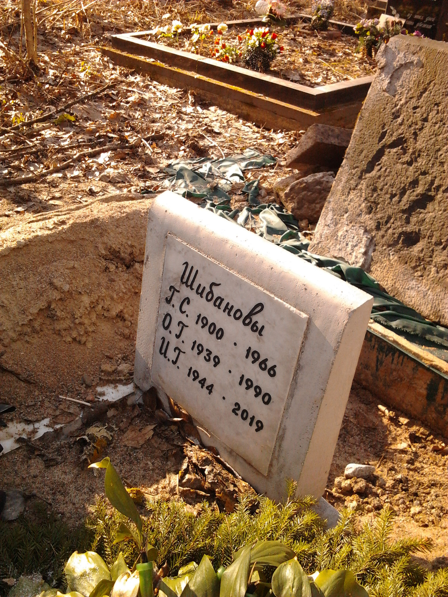 Надгробная плита на могиле И. Г. Шибанова.